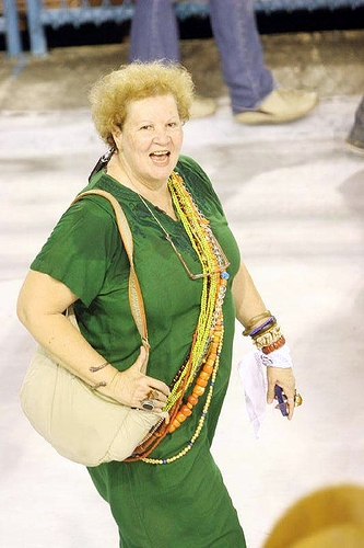 Fotógrafo Henrique Matos